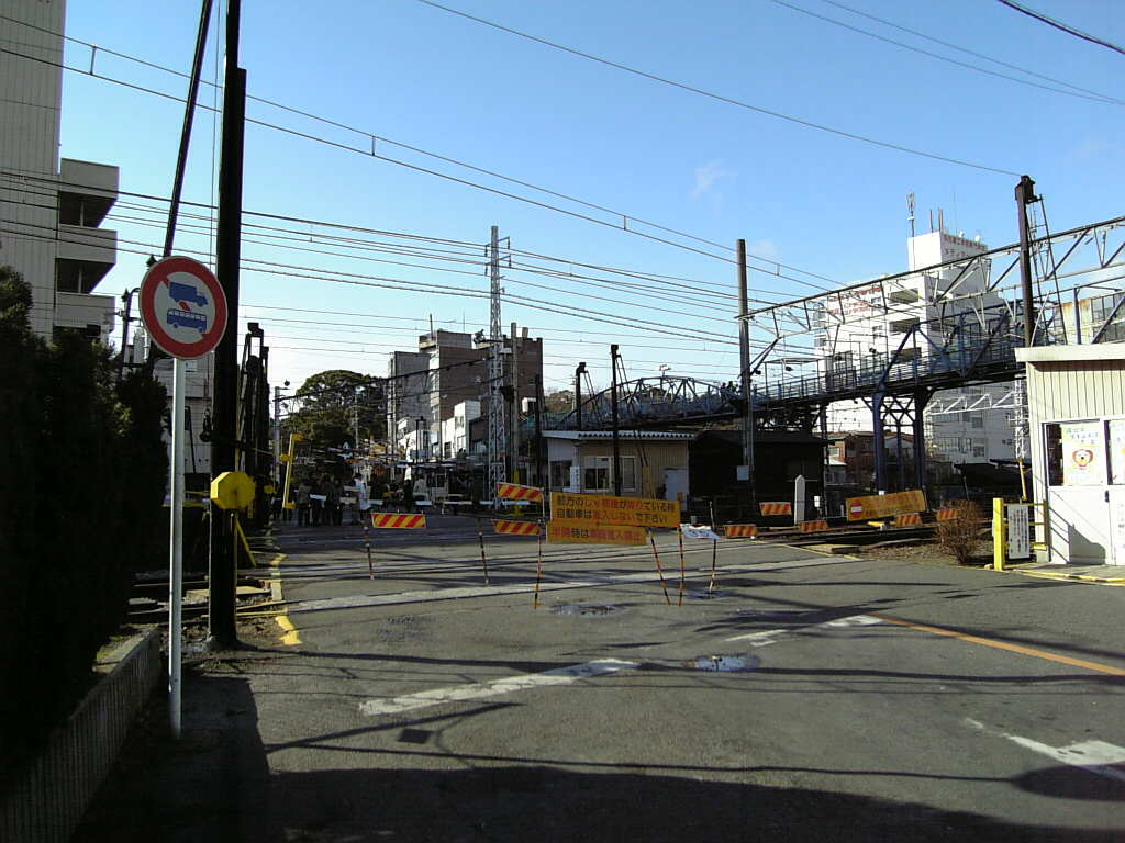 神宮前駅近くの第一種乙踏切